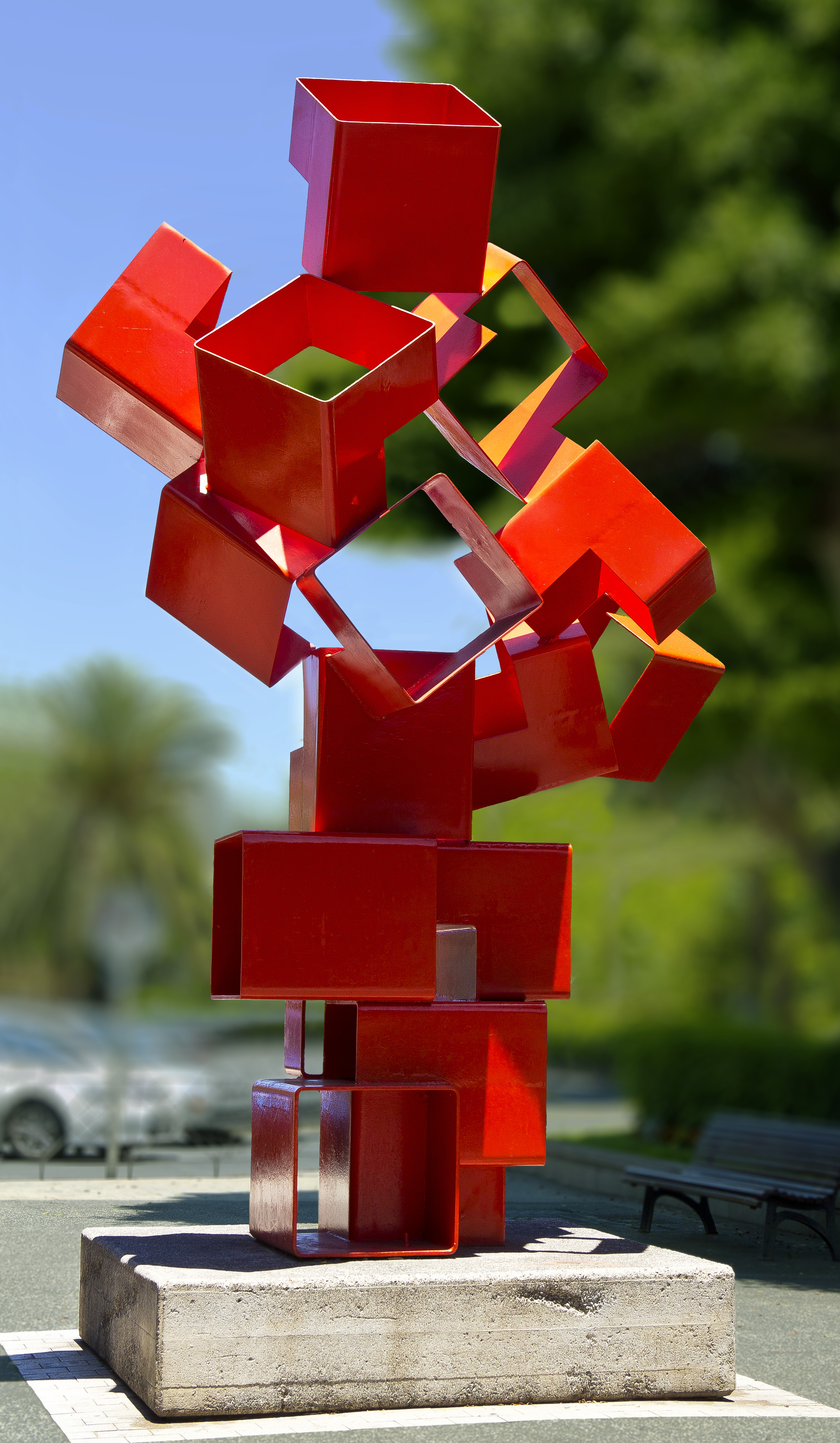 Die Plastik des aus Pasajes de San Pedro in Guipúzcoa (Spanien) stammenden Künstlers Ricardo Ugarte ist aus lackiertem Eisen. Sie befindet sich auf der Rambla de Santa Cruz in Santa Cruz de Tenerife. Das Werk wurde 1973 im Rahmen der „Exposición Internacional de Escultura en la Calle“ der Architektenkammer der Kanarischen Inseln aufgestellt. Die Maße sind 5,21 x 2, 76 x 2,40 m.